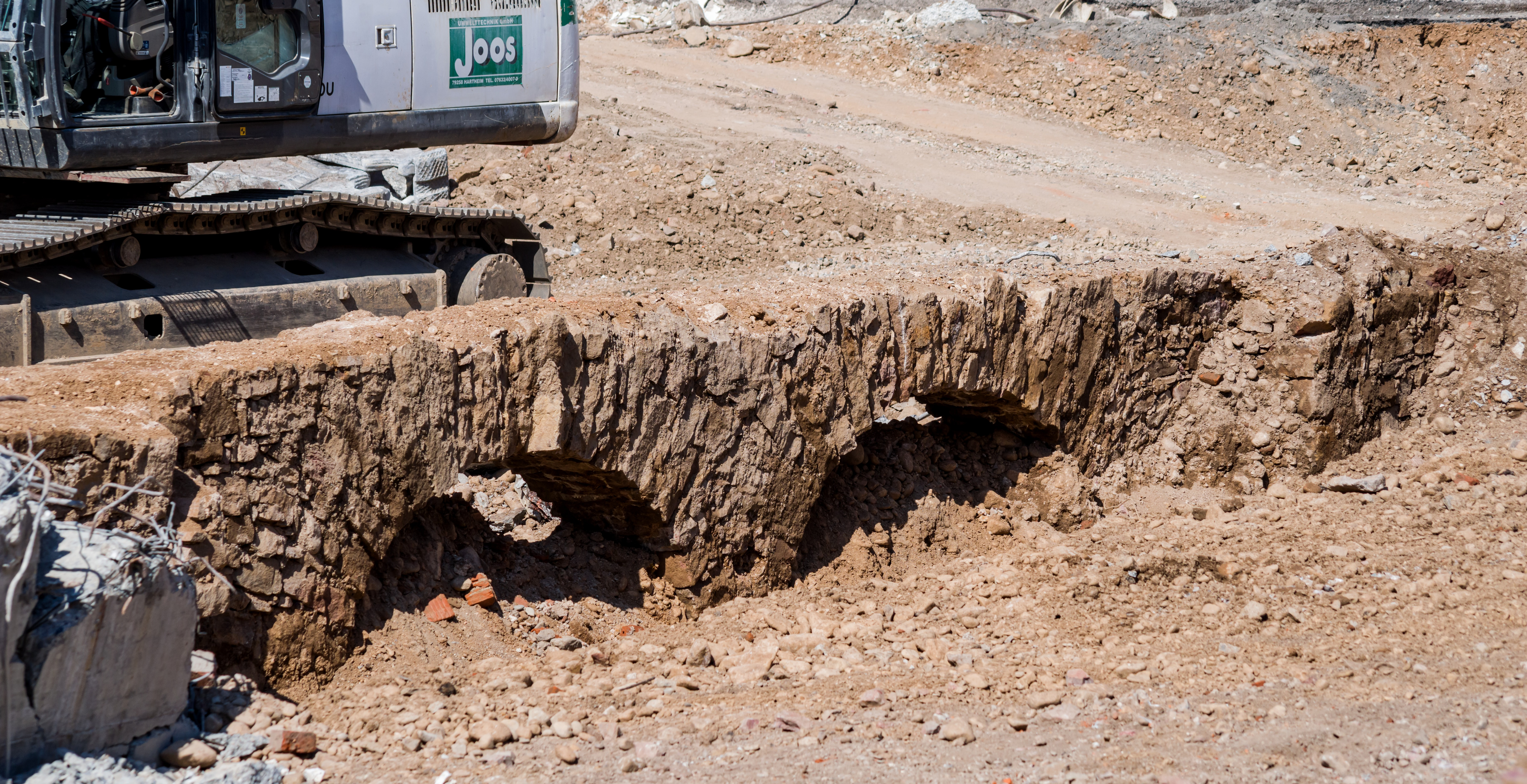 Mauerreste gefunden 2017 in Freiburg. Beim Umbau des Platzes am Siegesdenkmal sind Mauerreste aufgetaucht. Diese Mauerreste werden von Bertram Jenisch vom Landesdenkmalamt der Christoffelbastion zugeordnet. Diese Bastion lag vor dem Christophstor zwischen der Altstadt und der Vorstadt Neuburg. Die Bastion wurde nach dem Stadthistoriker Peter Kalchthaler vom Marquis de Choisy gebaut, als Freiburg 1677 von den Franzosen erobert wurde. Sie wurde dan unter Sébastien de Vauban in den Festungsring integriert. Die Mauerreste waren schon bei dem Umnbau 1962 gefunden worden, allerdings wurden sie nicht in den Karten verzeichnet. [1]